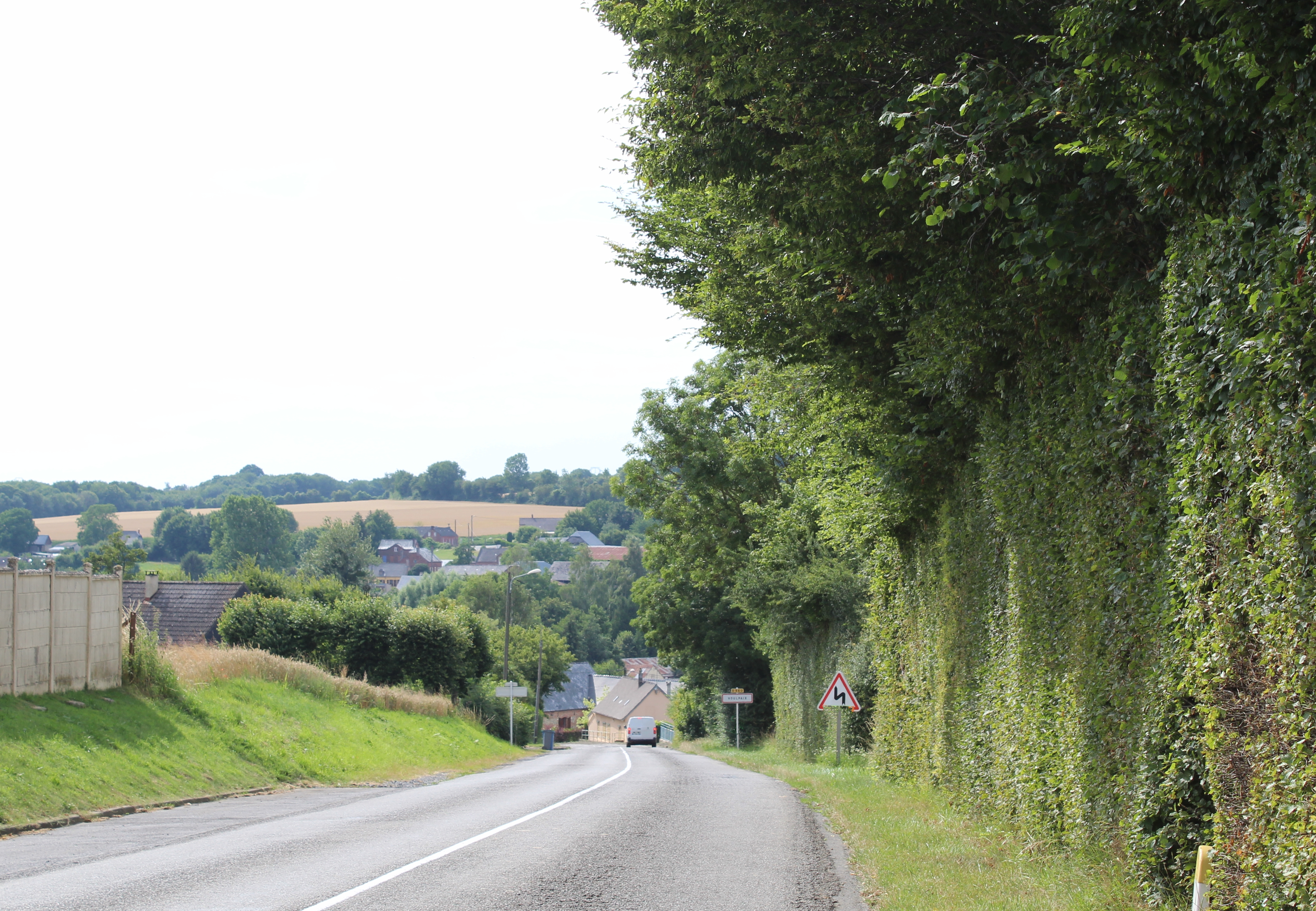 Entrée du village - Sens Vervins - Voulpaix